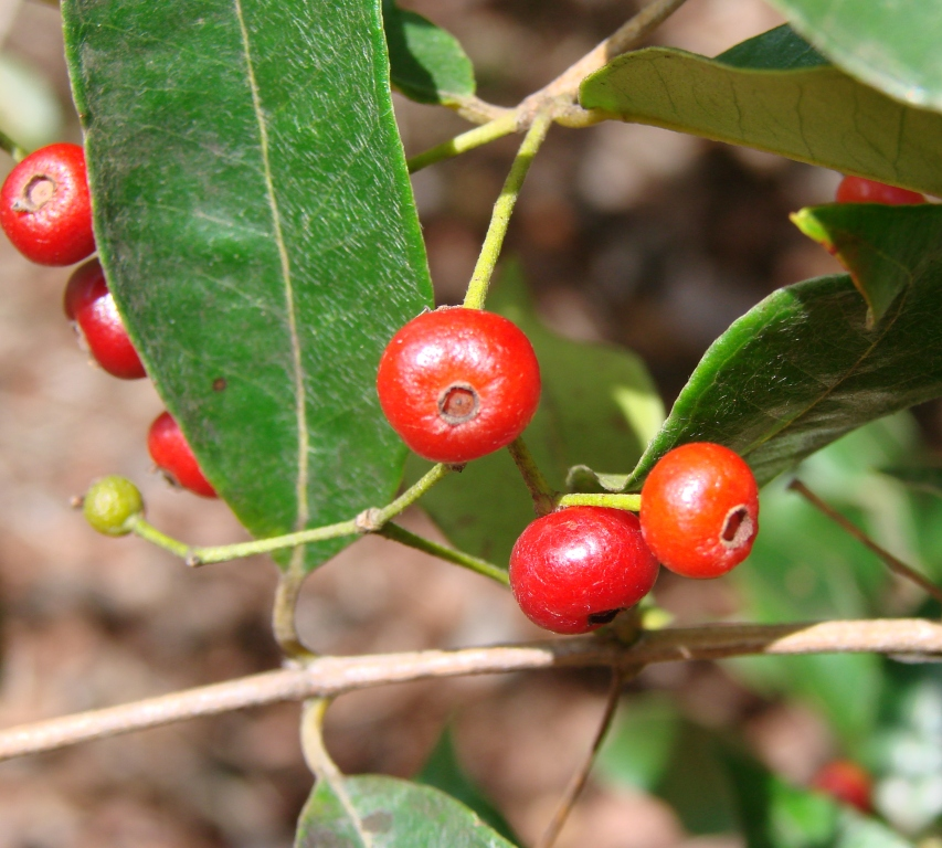 Blepharocalyx salicifolius - MYRTACEAE Jardim Botânico de Brasília, Distrito Federal - Brasil